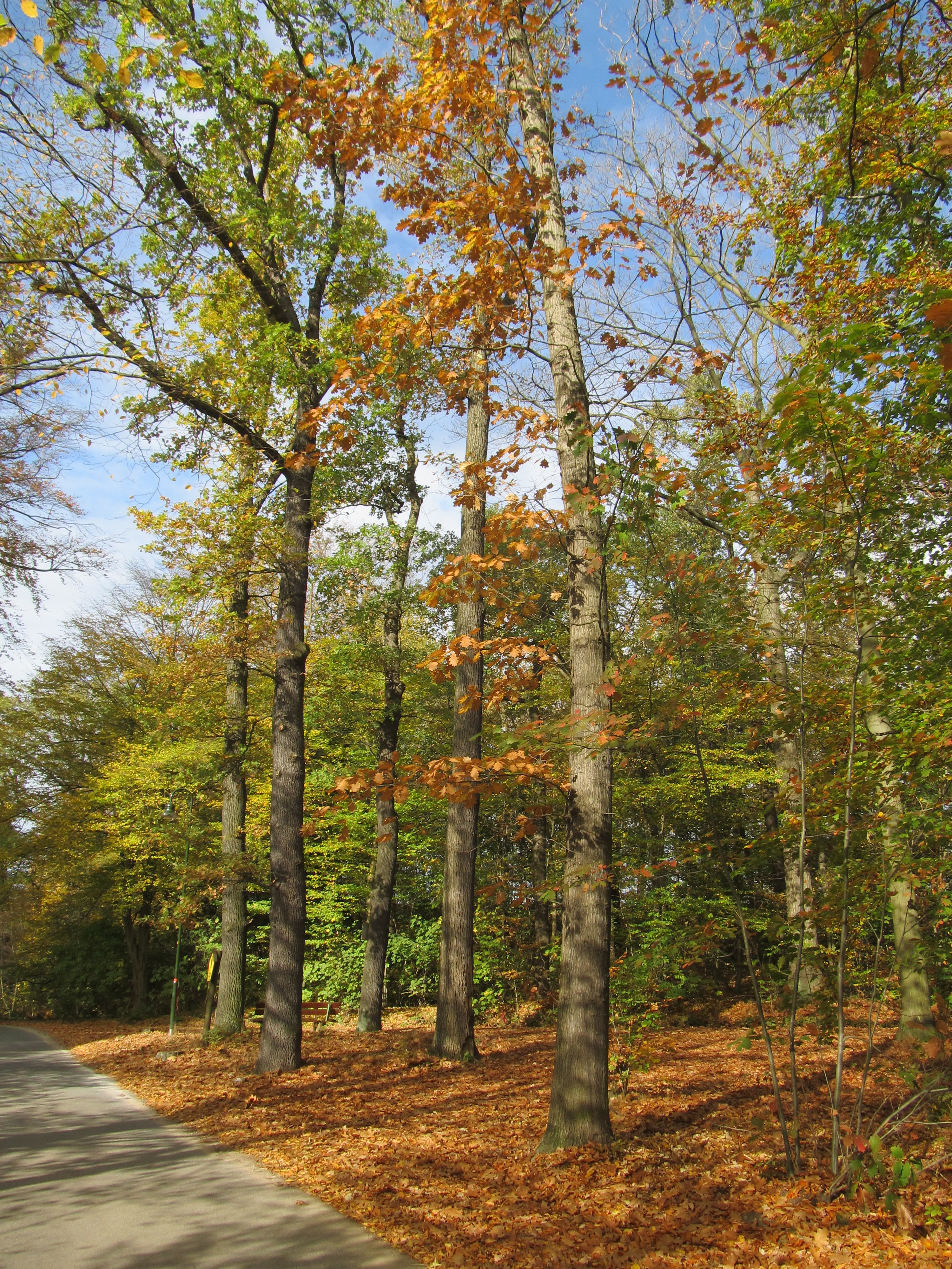 Sieben Friedenseichen in Langebrück, Dresden